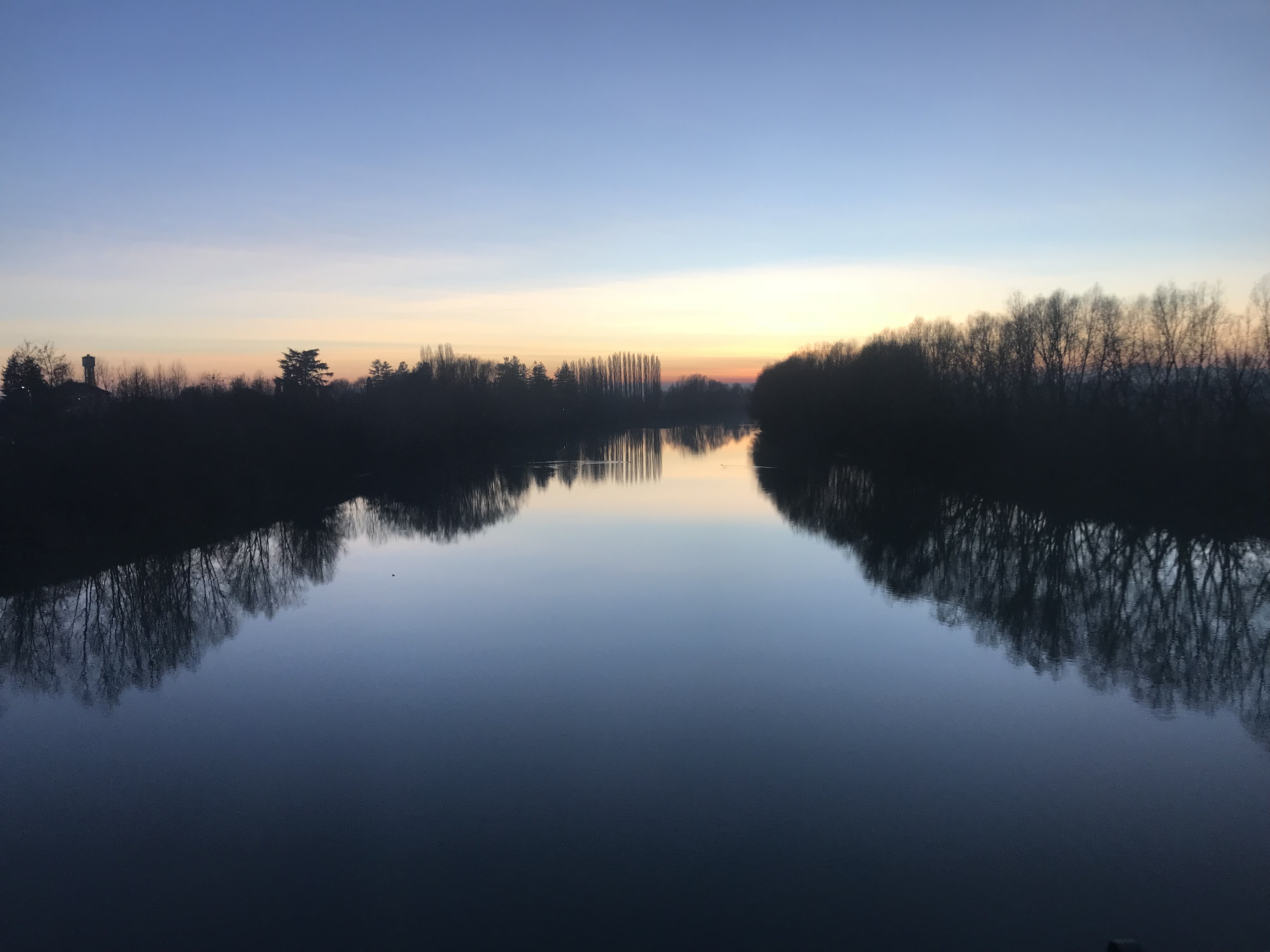 Fiume Tanaro al tramonto.